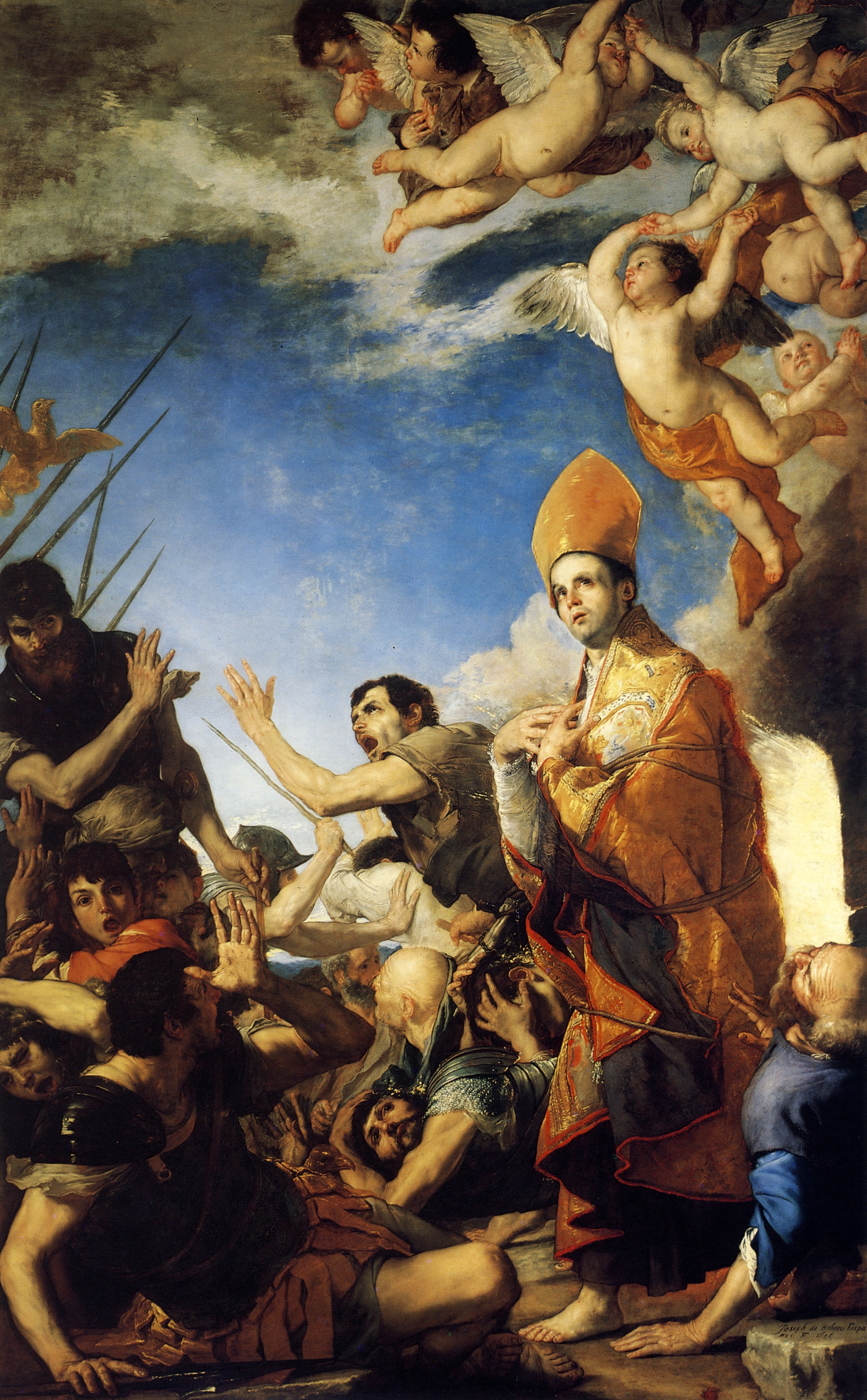 Jusepe de Ribera - San Gennaro esce dalla fornace (1646, cappella del tesoro di San Gennaro - Napoli). Olio su rame 320×200 cm